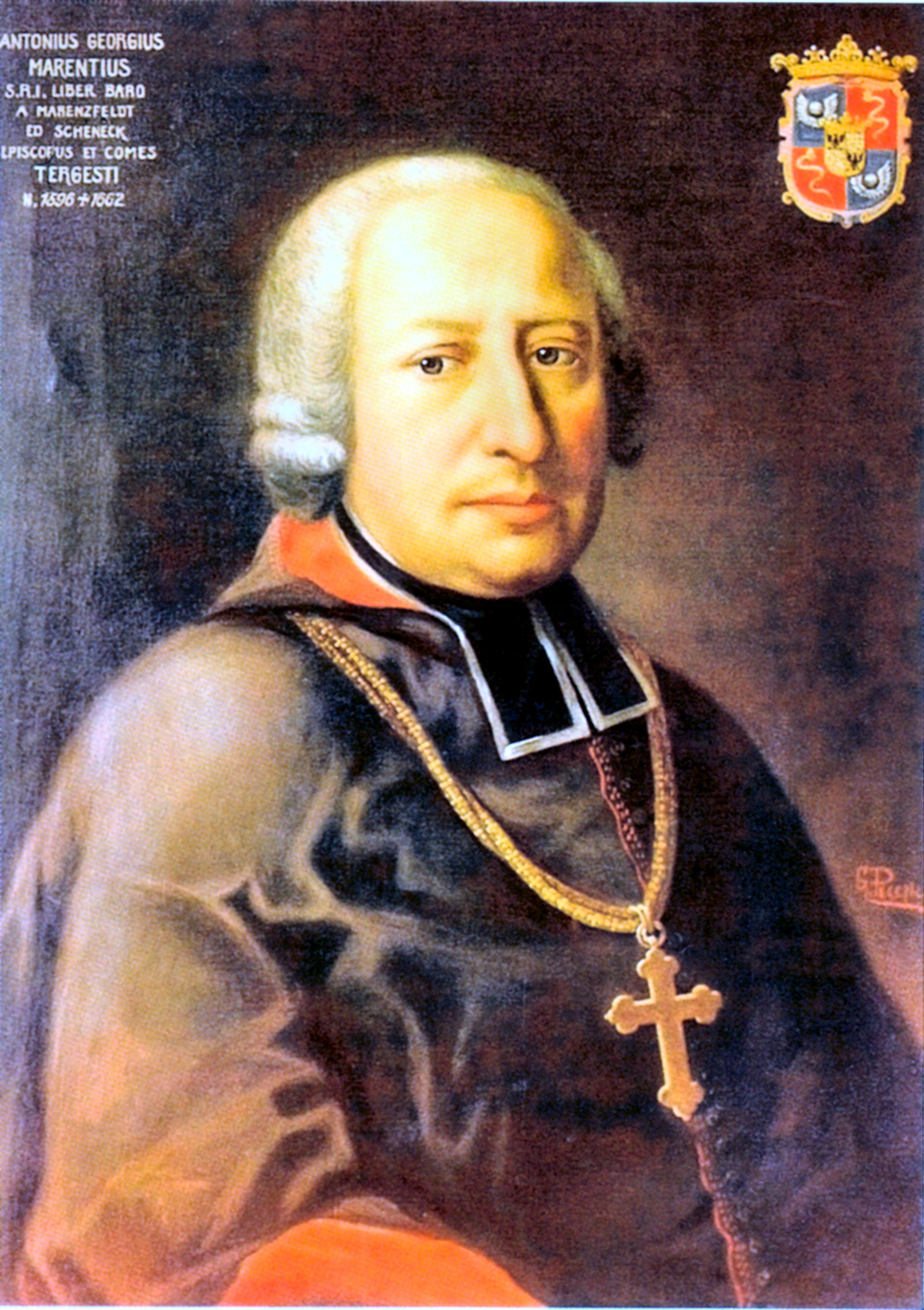 Bischof Anton Georg (Antonio Georgio) Marenzi von Tagliuno und Taglate, Freiherr von Mahrensfeld und Schönegg um 1655